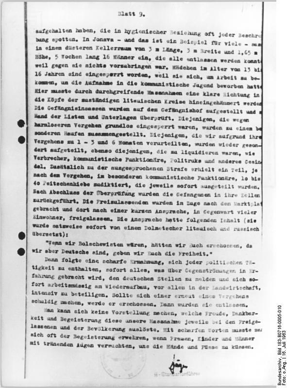 Oberstes Gericht, Globke-Prozess, Beweisstück Zentralbild 10.7.1963 Zum Globke-Prozeß: Dokumente über faschistische Greuel in der UdSSR. UBz: Reproduktion der auszugsweise während des 7. Verhandlungstages des Globke-Prozeßes am 15. Juli verlesenen Dokumente über faschistische Greuel in der Sowjetunion. Pedantisch genau zieht hier ein SS-Standartenführer Jäger die grausige Bilanz: "In Litauen gibt es keine Juden mehr." (siehe auch 2 - 9N)